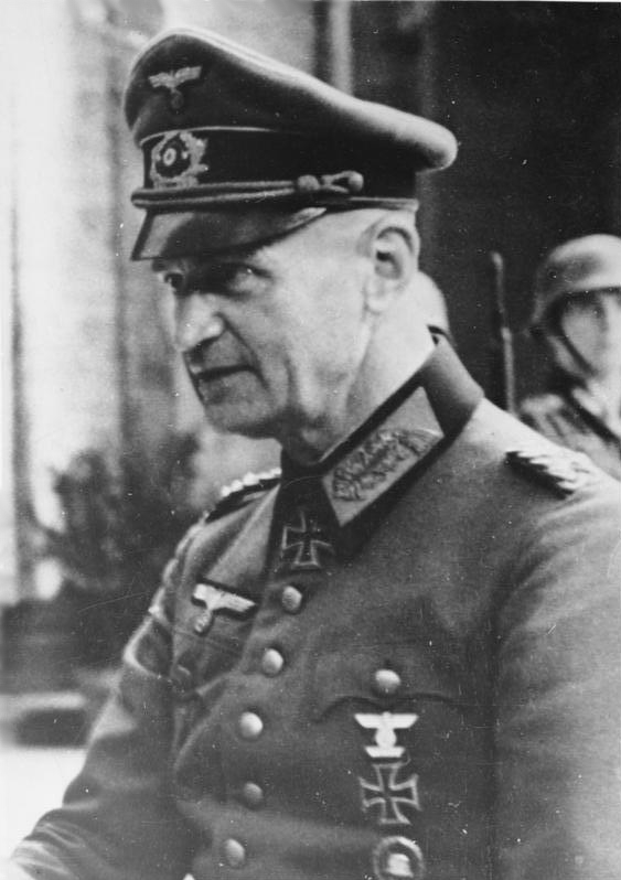 Johannes Blaskowitz Ritterkreuzträger Gen.-Oberst von Blaskowitz Chef des Stabes einer Armee. PK-Erwin Schulz/Scherl 598-44 B S 73 086 [Porträt Johannes Blaskowitz als Generaloberst mit Ritterkreuz des Eisernen Kreuzes (verliehen am 30.09.1939; Ritterkreuz des Eisernen Kreuzes mit Eichenlaub verliehen am 29.10.1944); 1944] Abgebildete Personen: Blaskowitz, Johannes: 1883-1948; Generaloberst, Ritterkreuz (RK), Heer, Deutschland (PND 119093480)